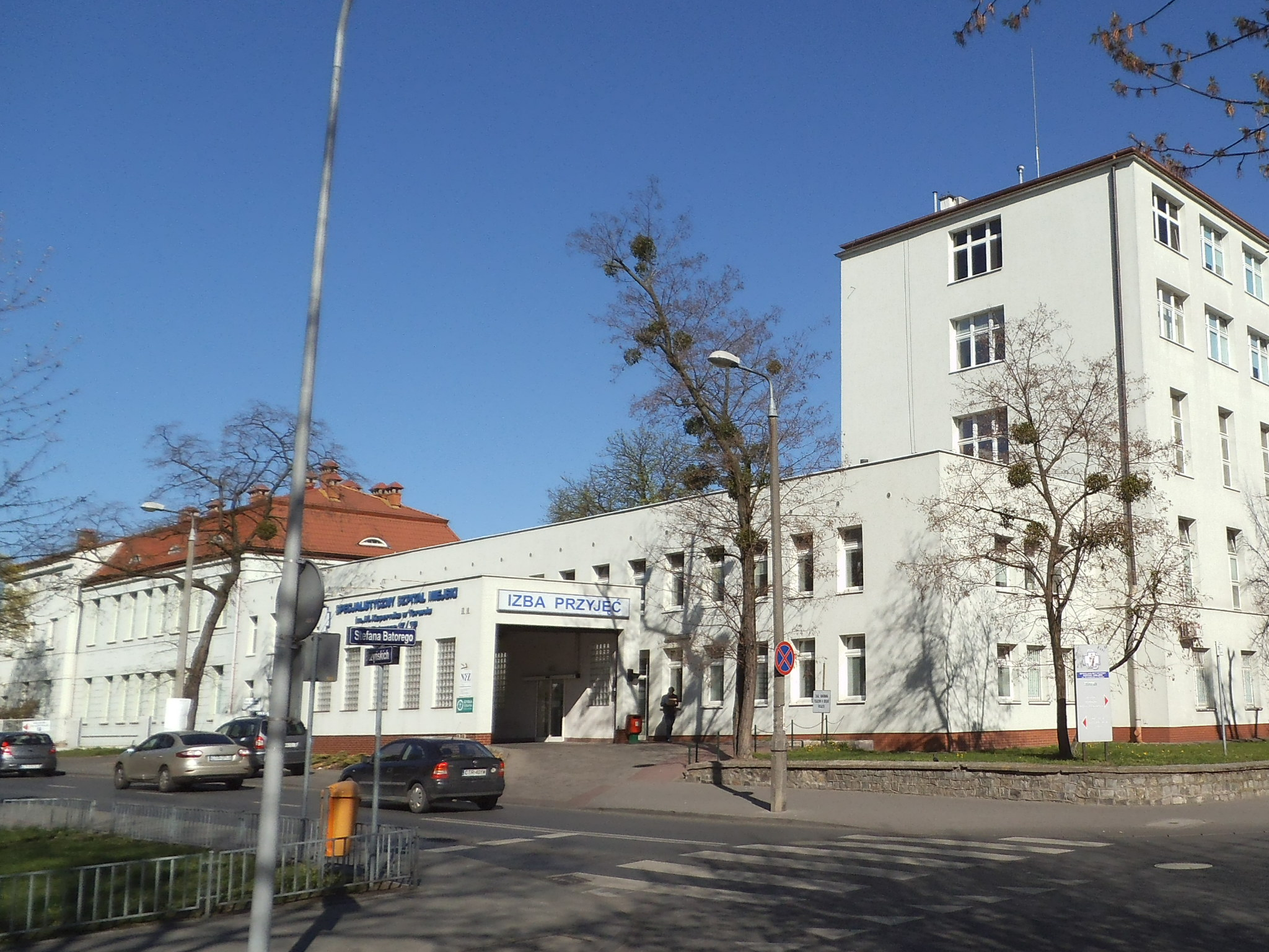 Szpital Miejski w Toruniu3